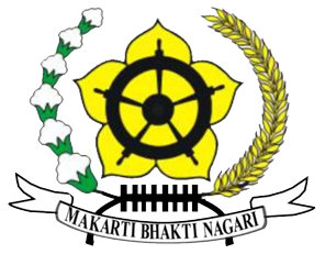 Logo Lembaga Administrasi Negara